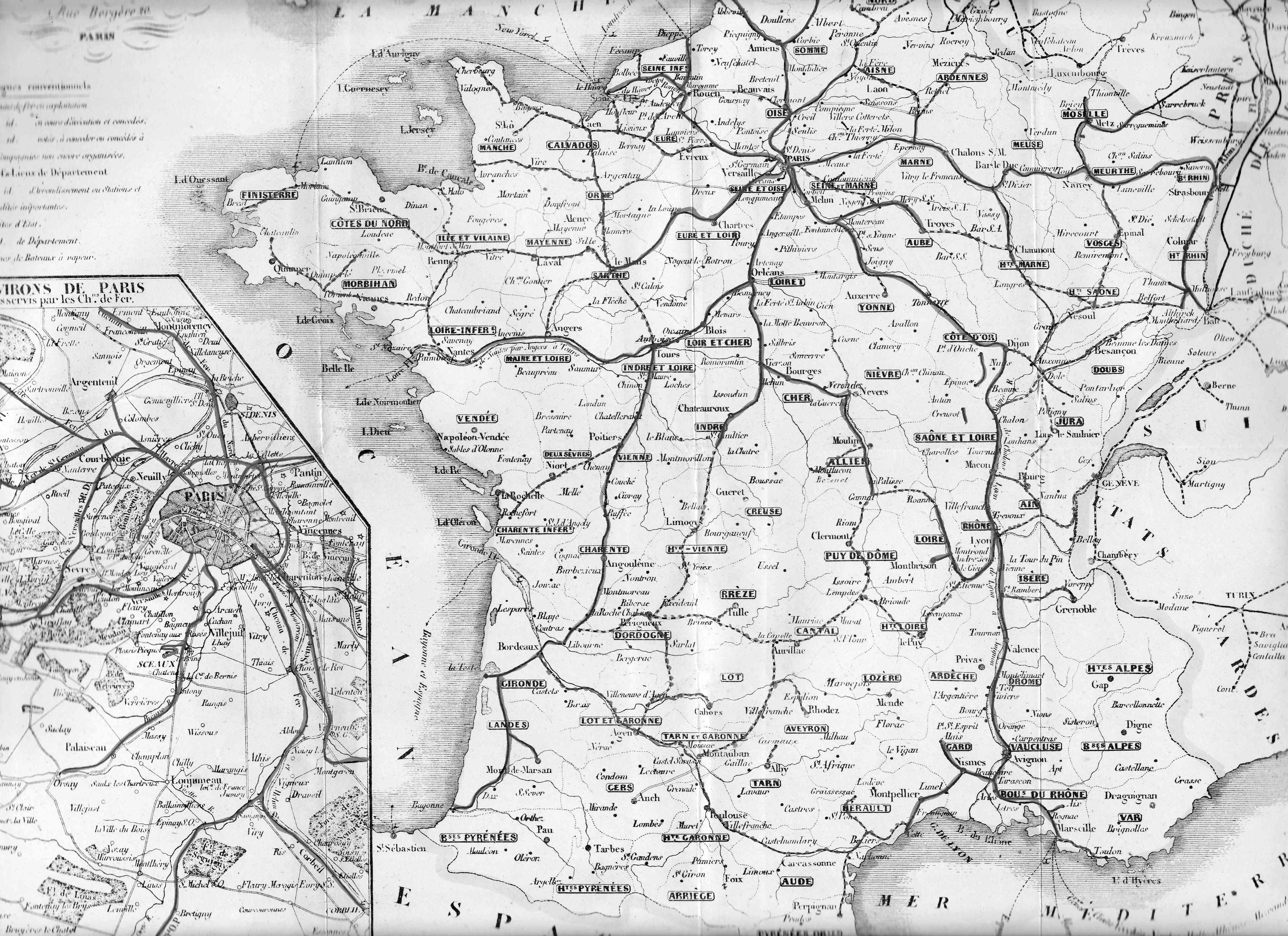 Carte des chemins de fer français en 1855.